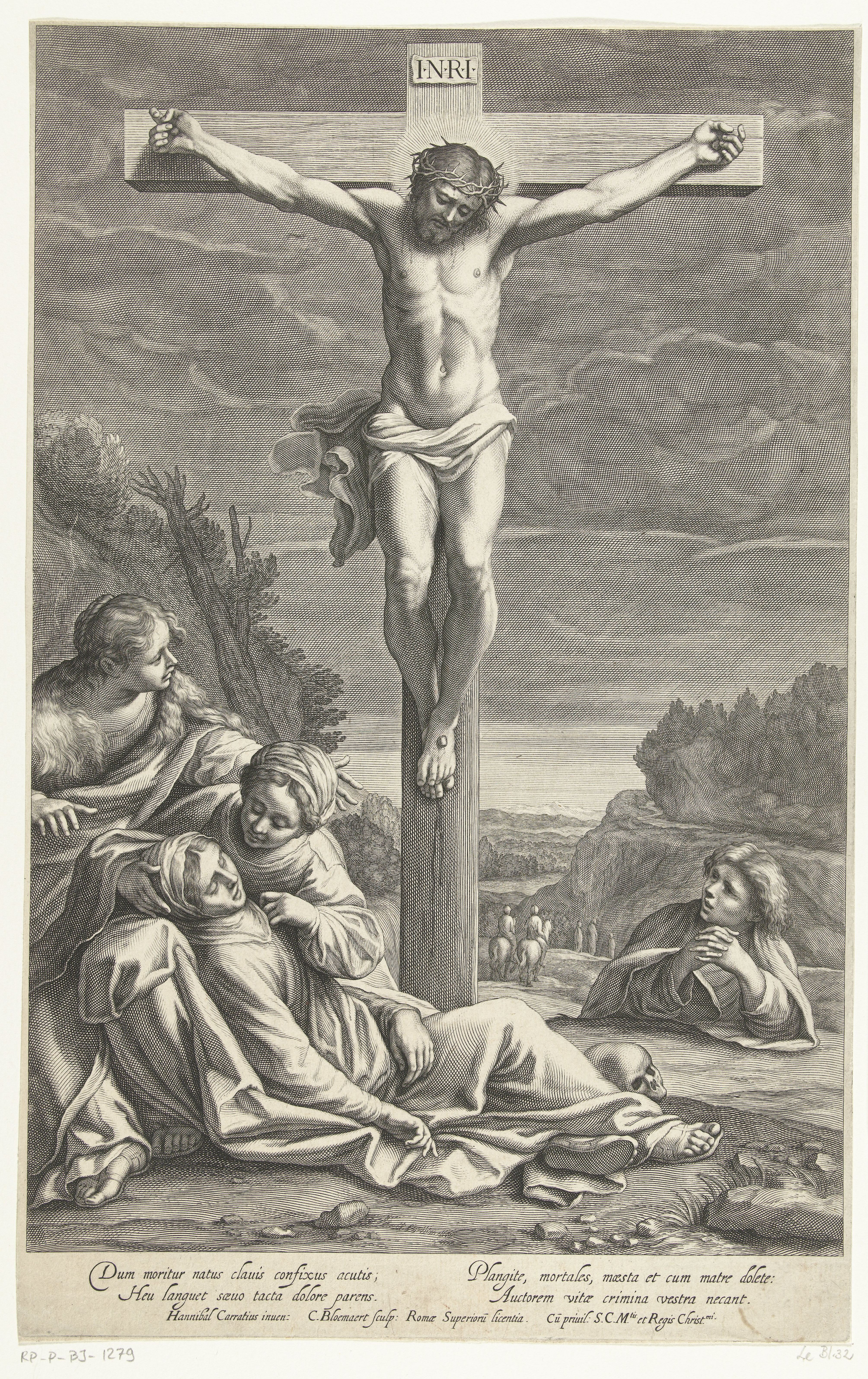 Kruisiging